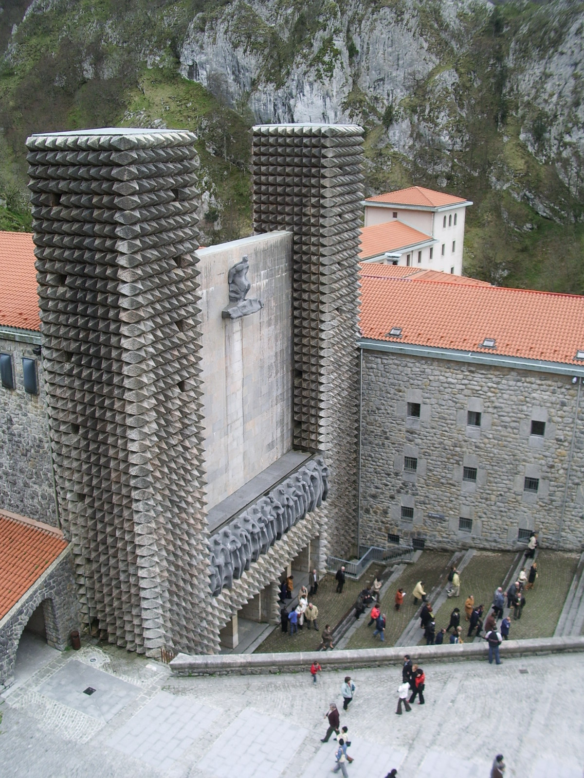 Irudia/Image: Arantzazu santutegia, Oñati, Gipuzkoa Egilea/Author: Josu Goñi Etxabe